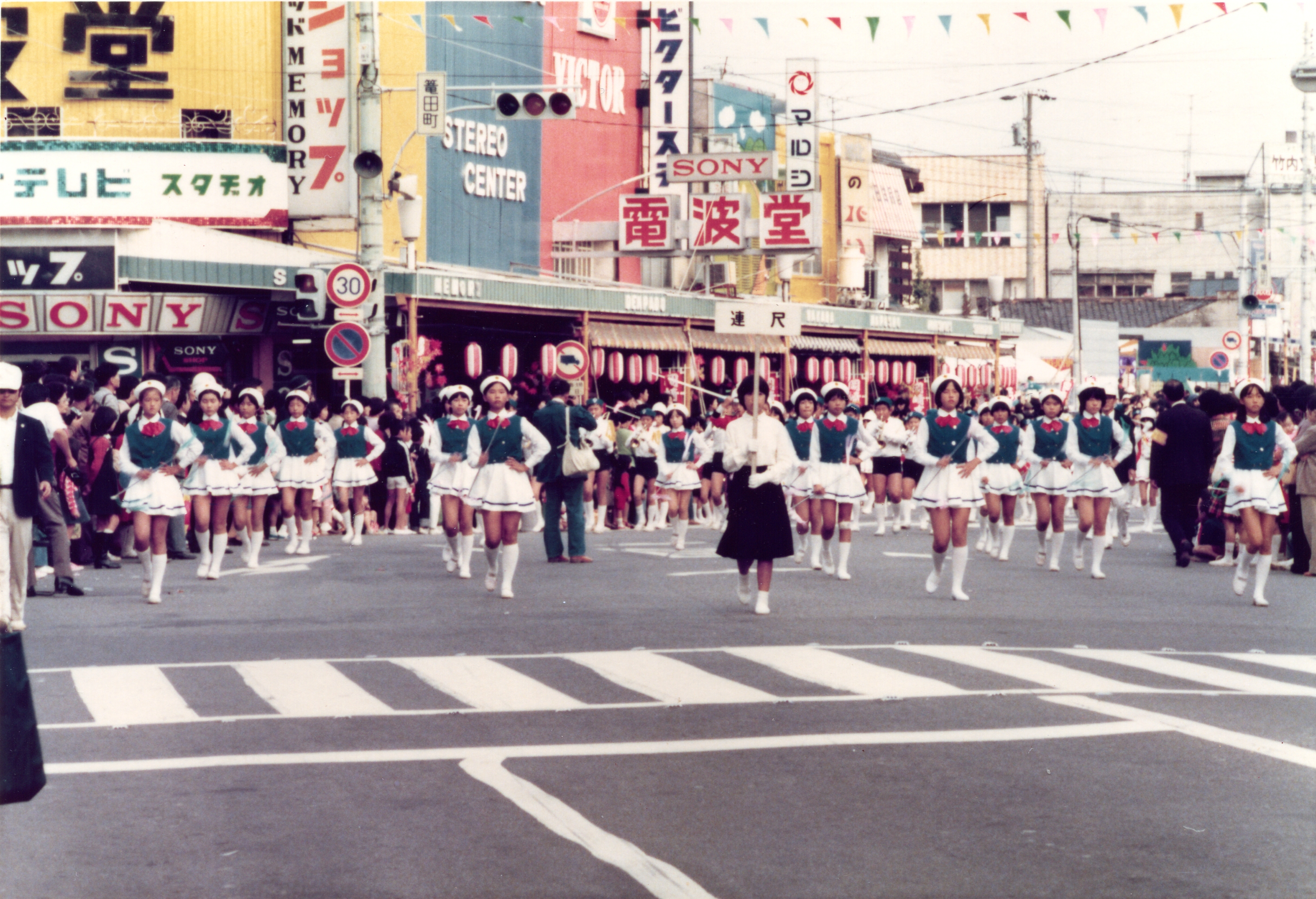 愛知県岡崎市籠田町。交通安全音楽大パレード。